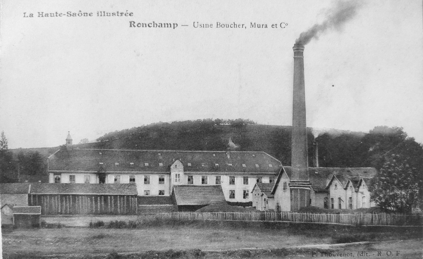 Tissage Ronchamp XXe (3)